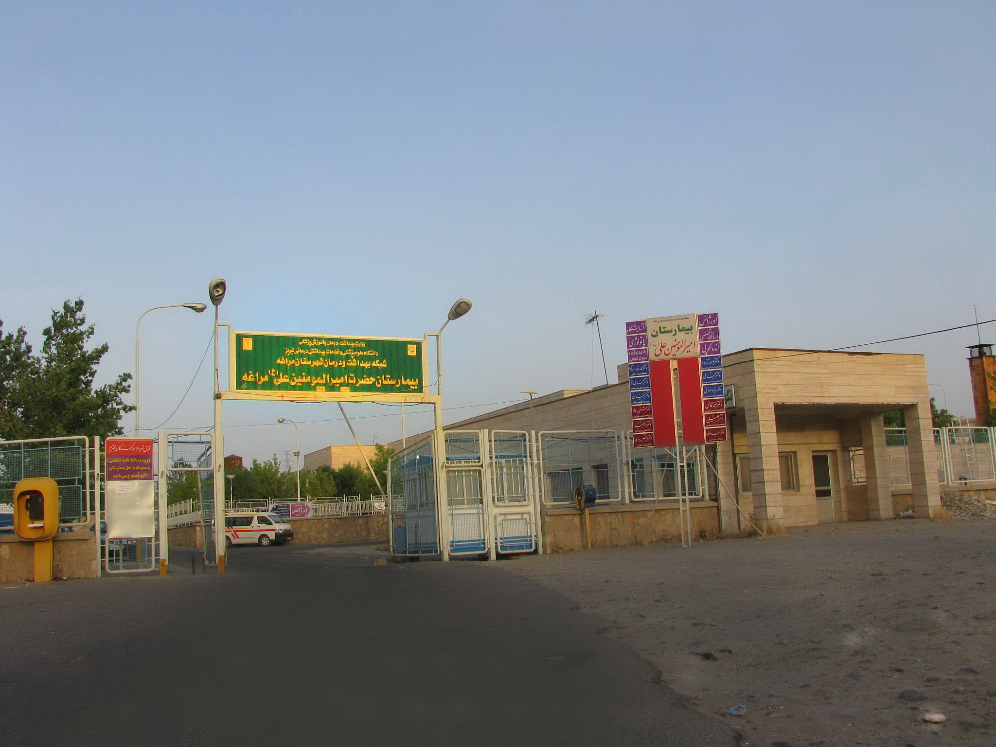 بيمارستان اميرالمومنين مراغه